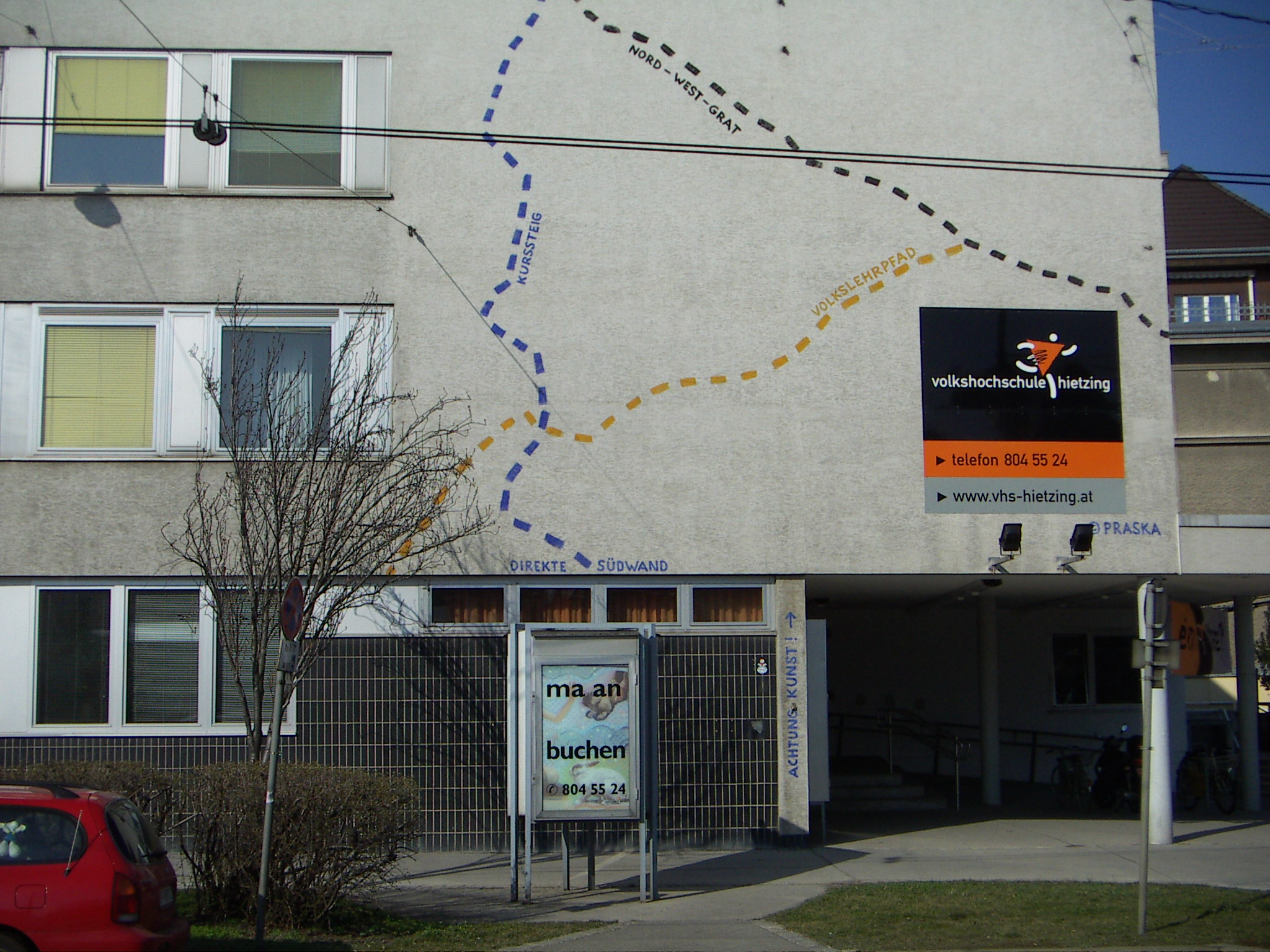 Vienna, 1130, Education, Volkshochschule Hietzing; Fassade, Künstler Martin Praska, Südwand, Climb ART; Architekt Fred Freyler Realisation 1971-74.